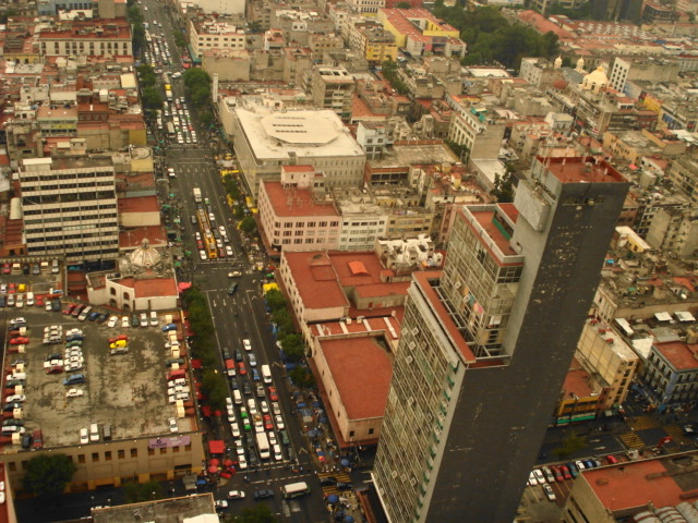 Edificio Miguel E Abed en la Ciudad de México.